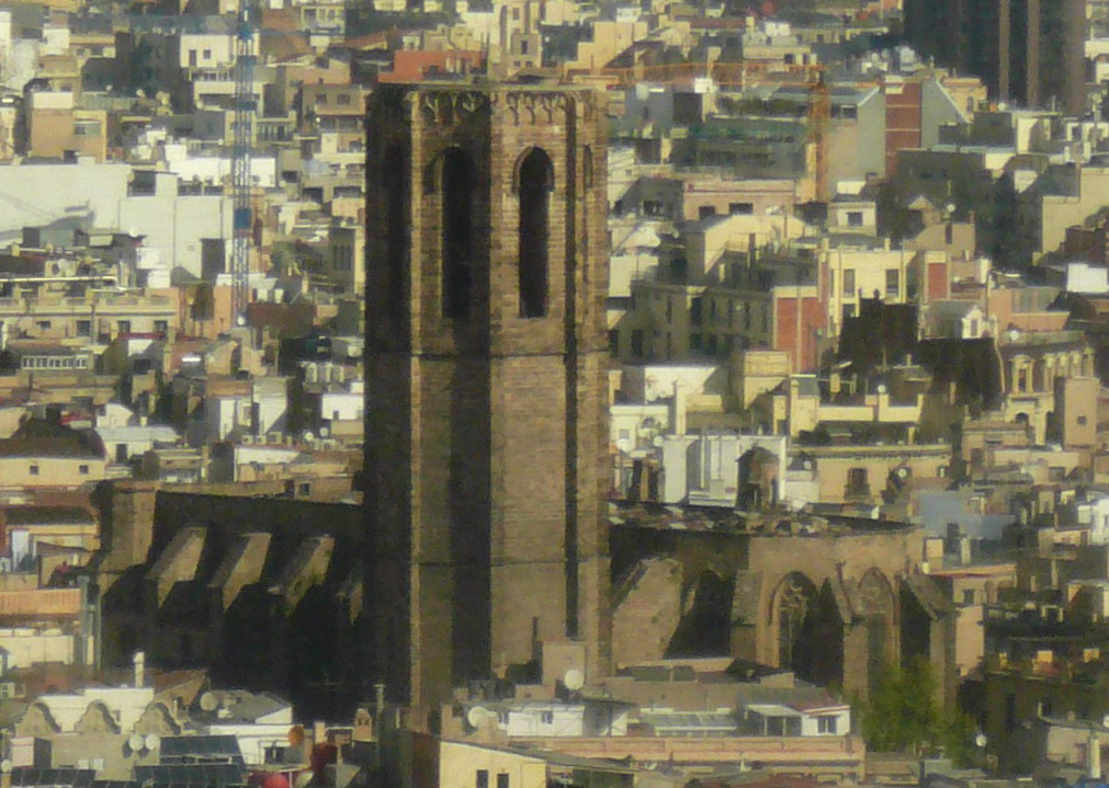 Santa Maria del Pi de Barcelona des del gratacels de l'avinguda de les Drasanes.